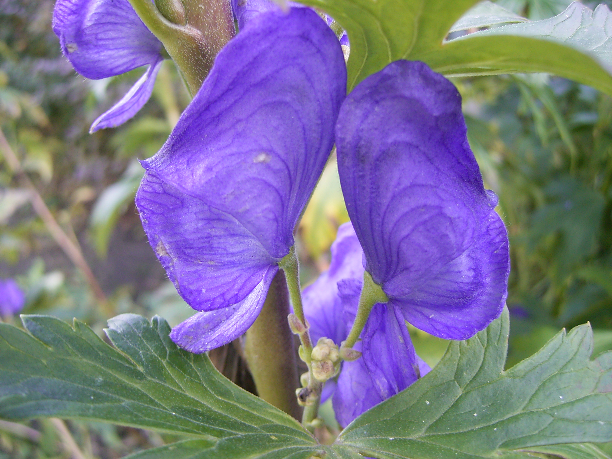 Deze foto toont 2 bloemen van de Aconitum carmichaelli 'arendsii'. Ik nam de foto in het Zuiderpark in Den Haag. This photo shows 2 flowers of Aconitum carmichaelli 'arendsii'. I took the photo in Den Haag, Nederland.